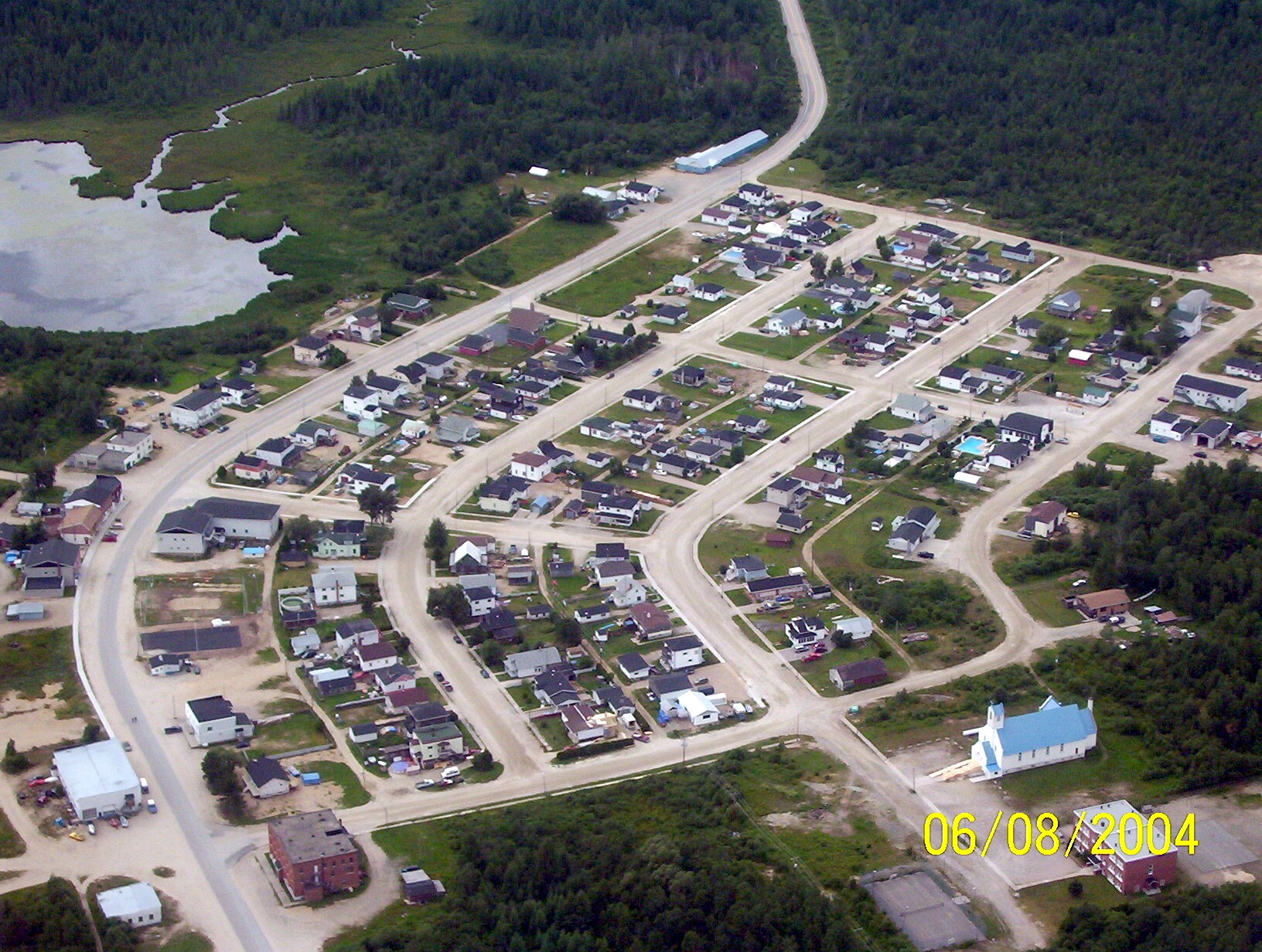 Belleterre Vue du ciel